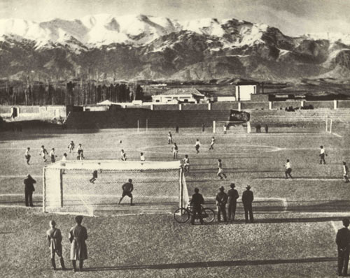 Amjadie Stadium of Iran